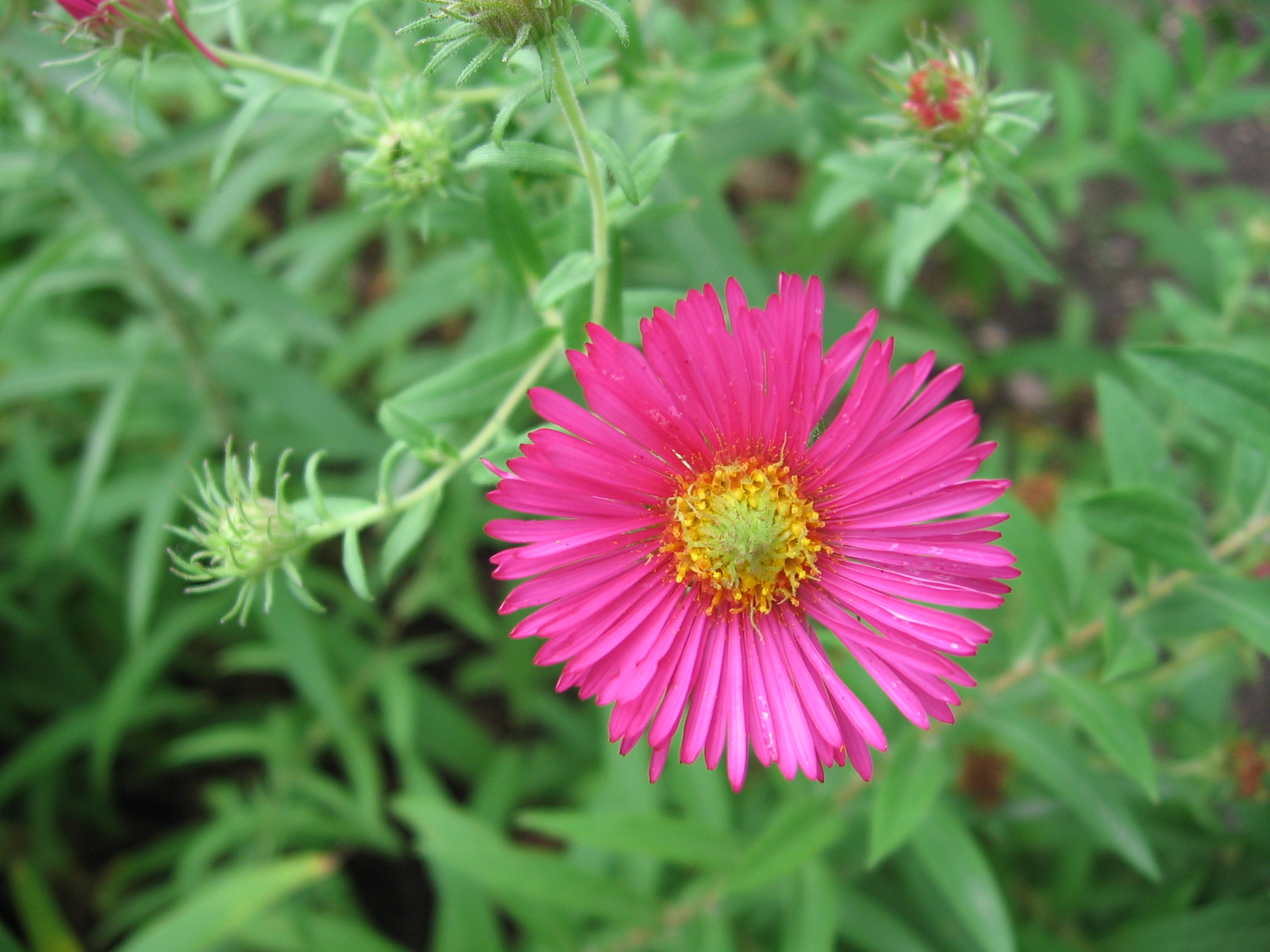 Aster novae-angliae. Foto tomada en el Real Jardín Botánico de Madrid.